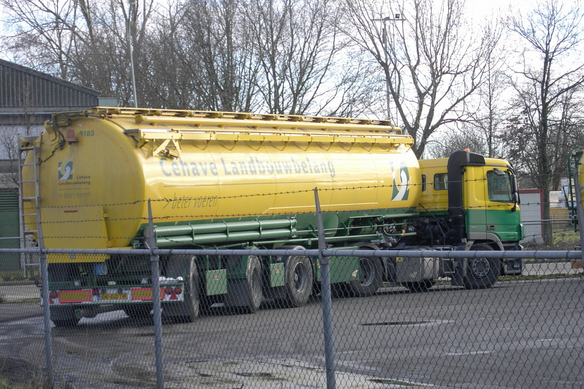 Silo LKW der Firma Cehave Landbouwbelang, Maasbracht